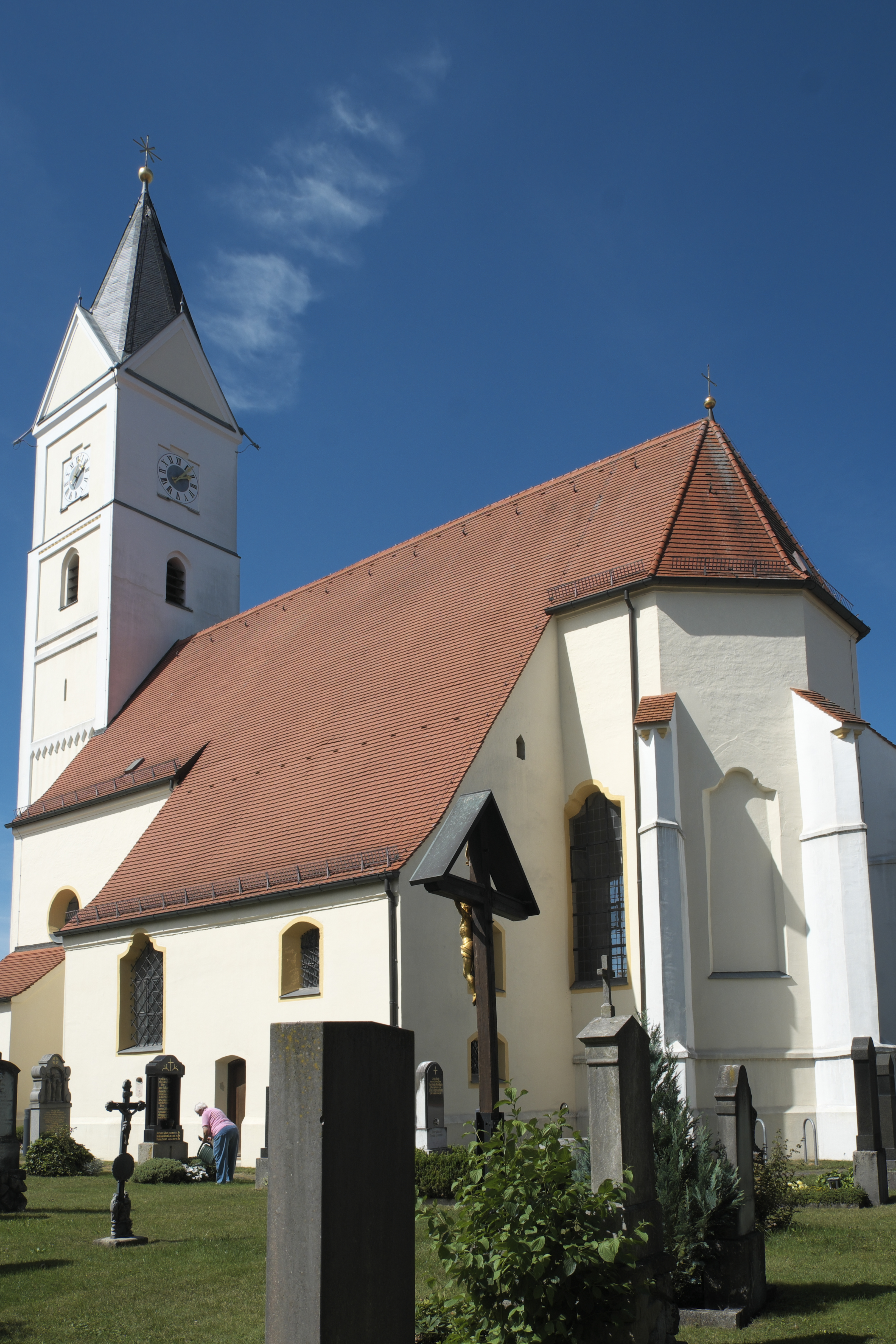 Alte katholische Pfarr- und Wallfahrtskirche St. Wilgefortis in Neufahrn bei Freising im oberbayerischen Landkreis Freising (Bayern/Deutschland)